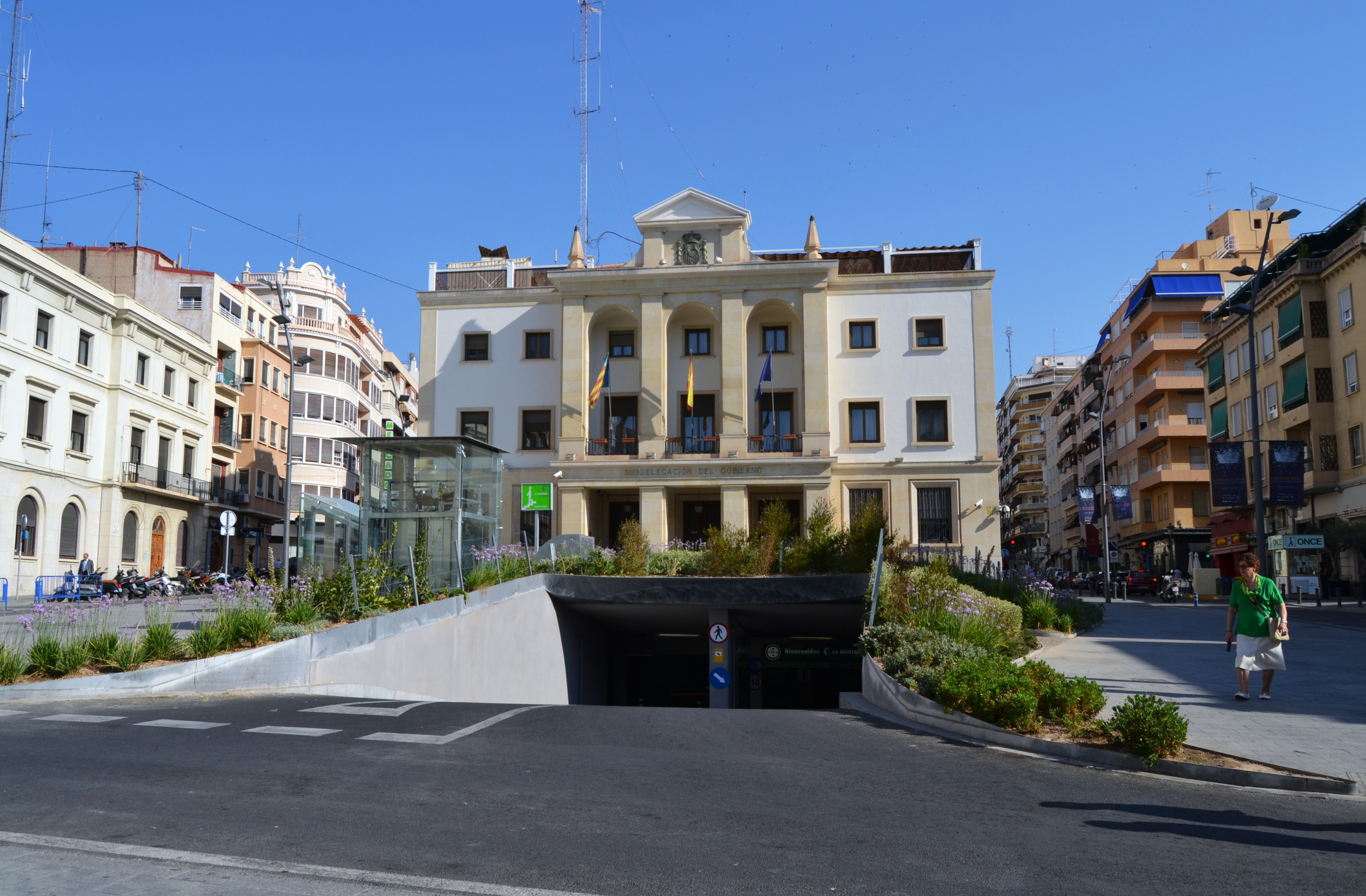 Entrada a l'aparcament i subdelegació, plaça de la Muntanyeta d'Alacant.